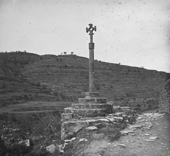 Creu de terme Copons. Josep Salvany i Blanch (1914)